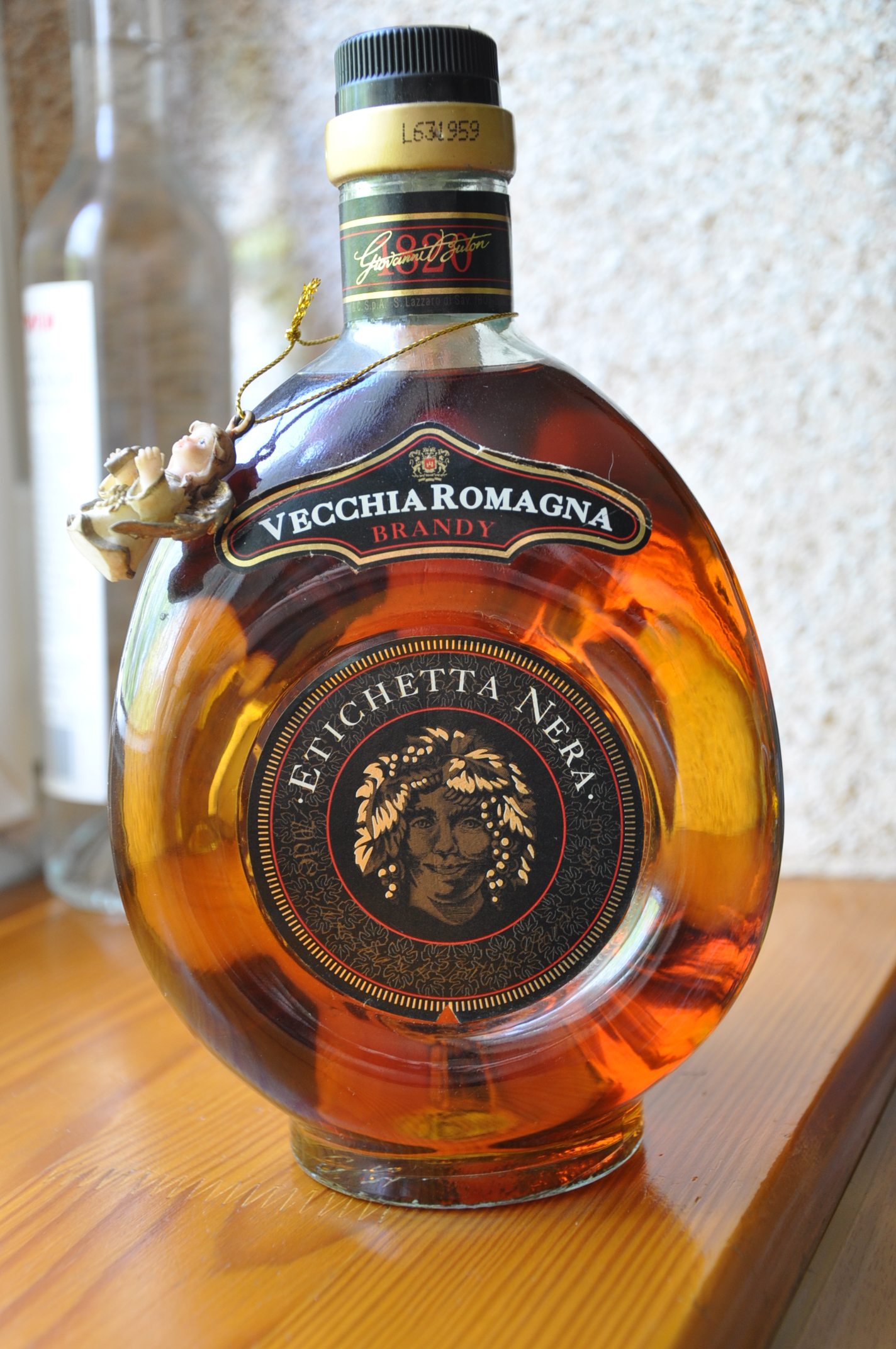 Vecchia Romagna Brandy. Etichetta Nera. 700ml